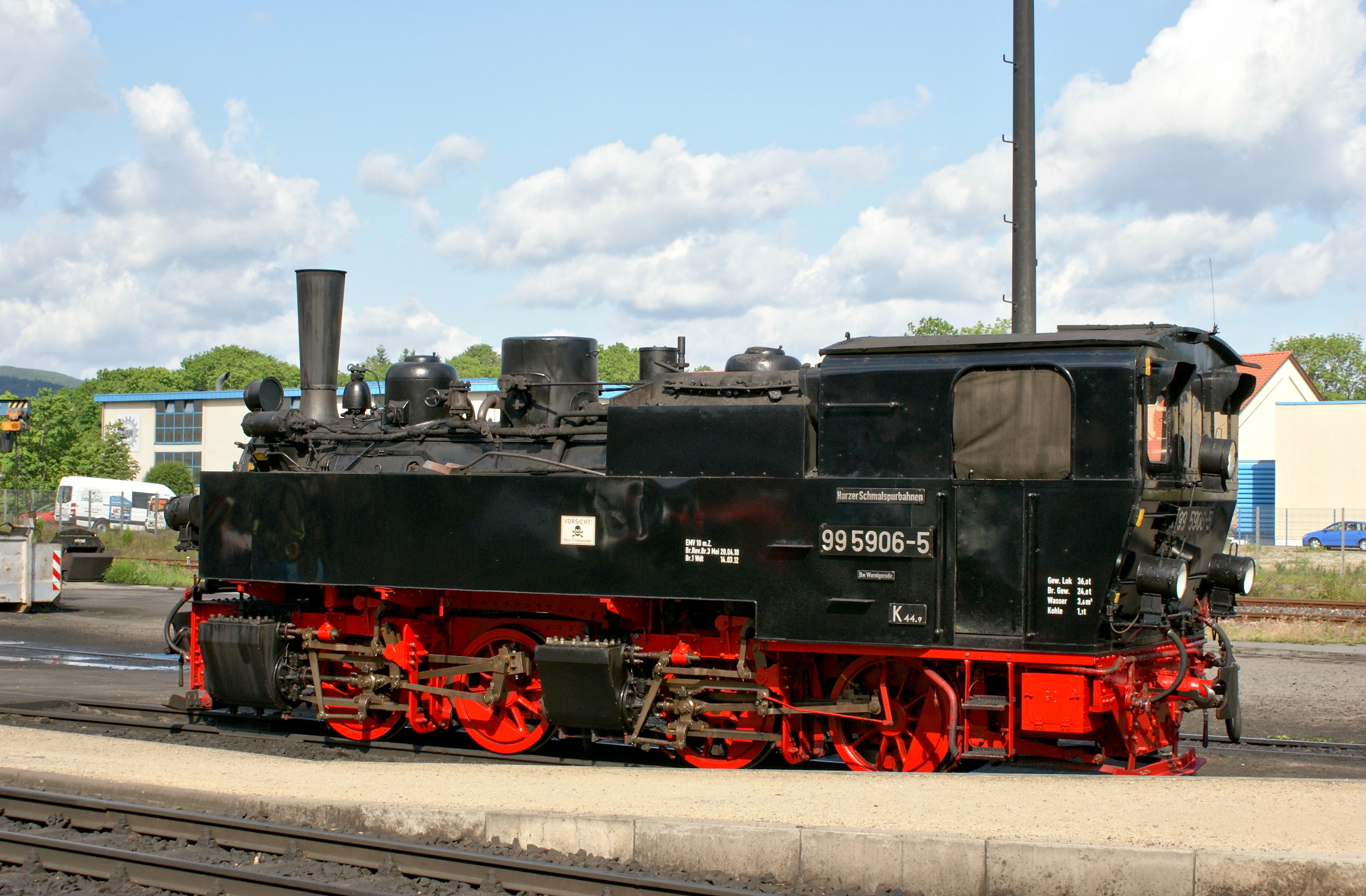 Dampflokomotive 99 5906 der HSB (ex DR 99 5906 ex NWE 41) Karlsruhe 2052/1918 B´Bn4vt in der Einsatzstelle Wernigerode am 09.Juni 2012